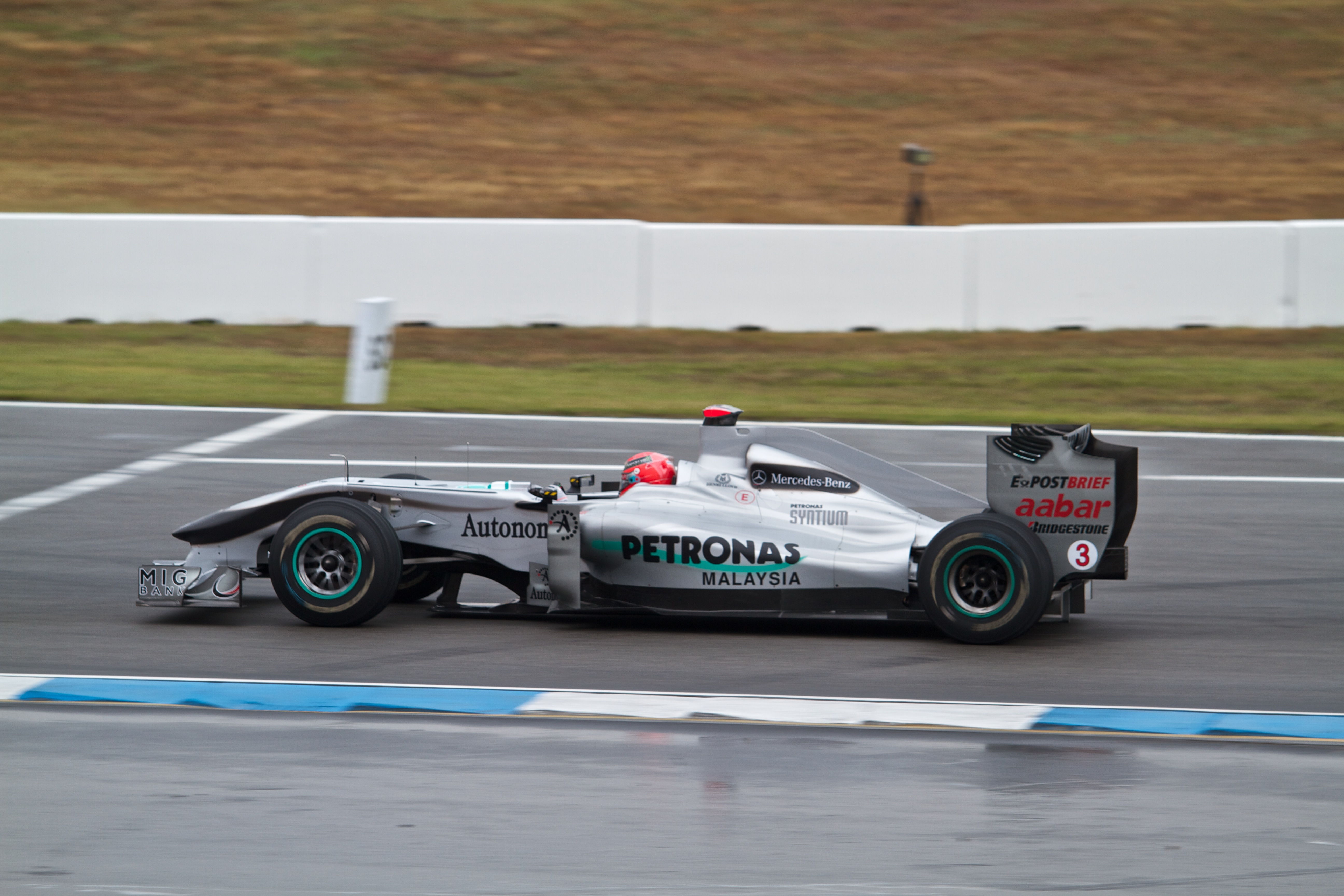 Michael Schumacher à Hockenheim en 2010